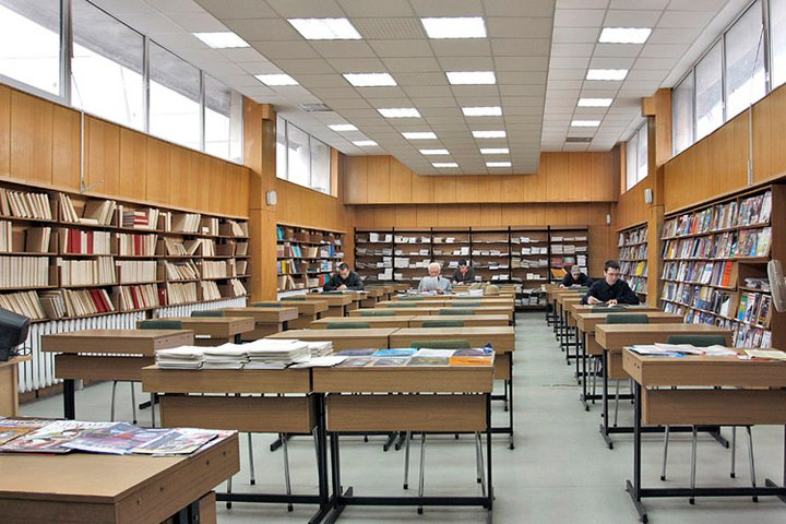 Читалня УНСС